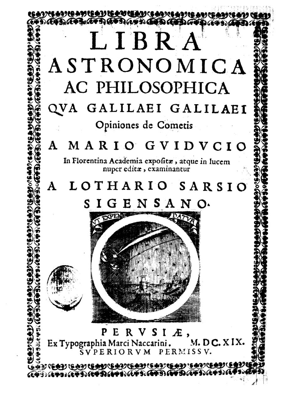 Libra astronomica ac philosophica qua Galilaei Galilaei opiniones de cometis a Mario Guiducio in Florentina Academia expositae, atque in lucem nuper editae, examinantur a Lothario Sarsio Sigensano. - Perusiae : ex Typographia Marci Naccarini, 1619. - 72 p. : ill. ; 4º . [1]